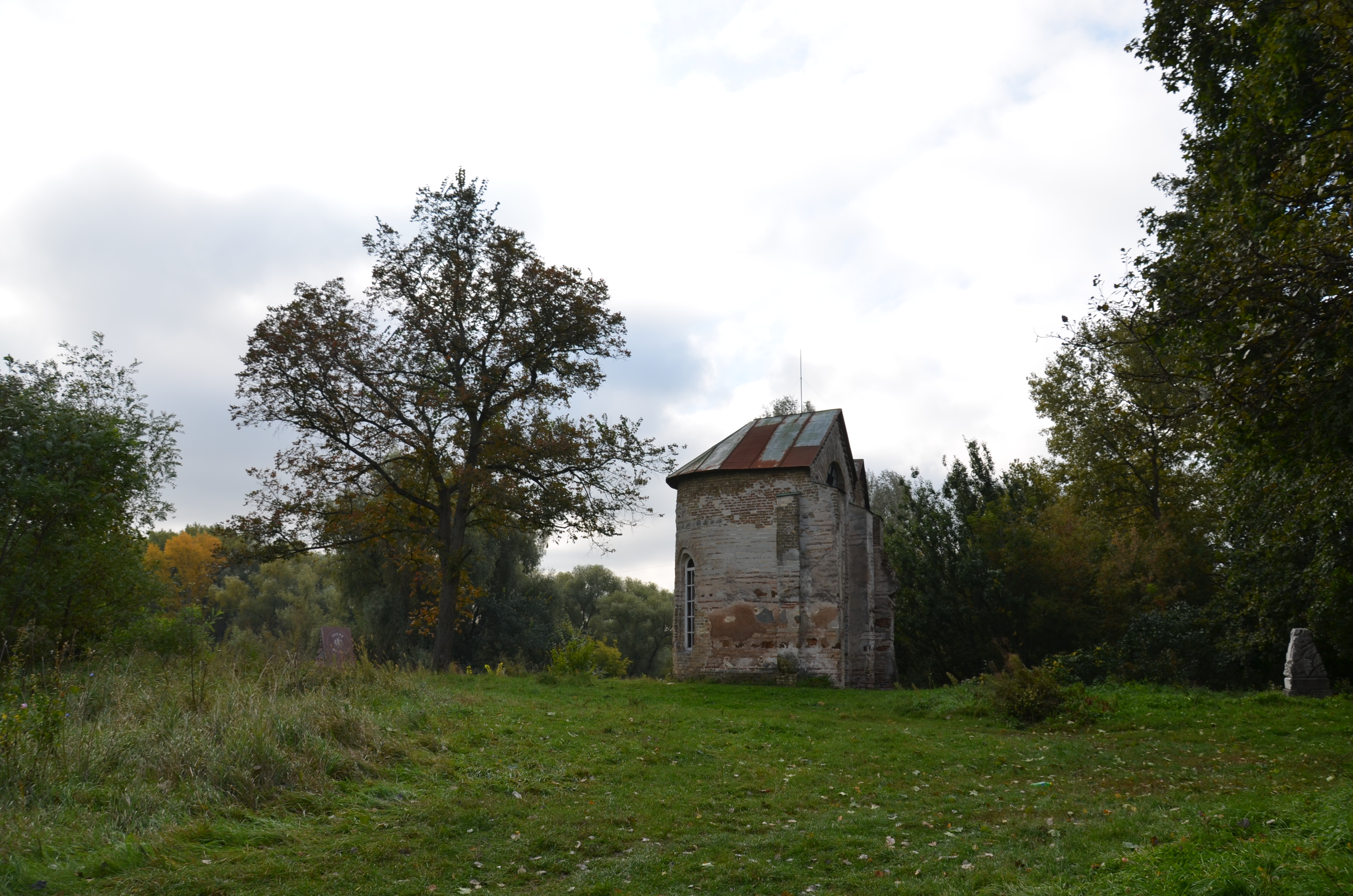 Городище-дитинець літописного міста Городець-на-Острі